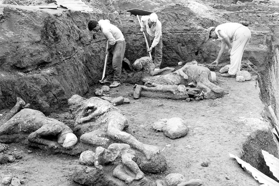 Pompei - Orto dei Fuggiaschi (I 21,6) scavo dei calchi delle vittime.